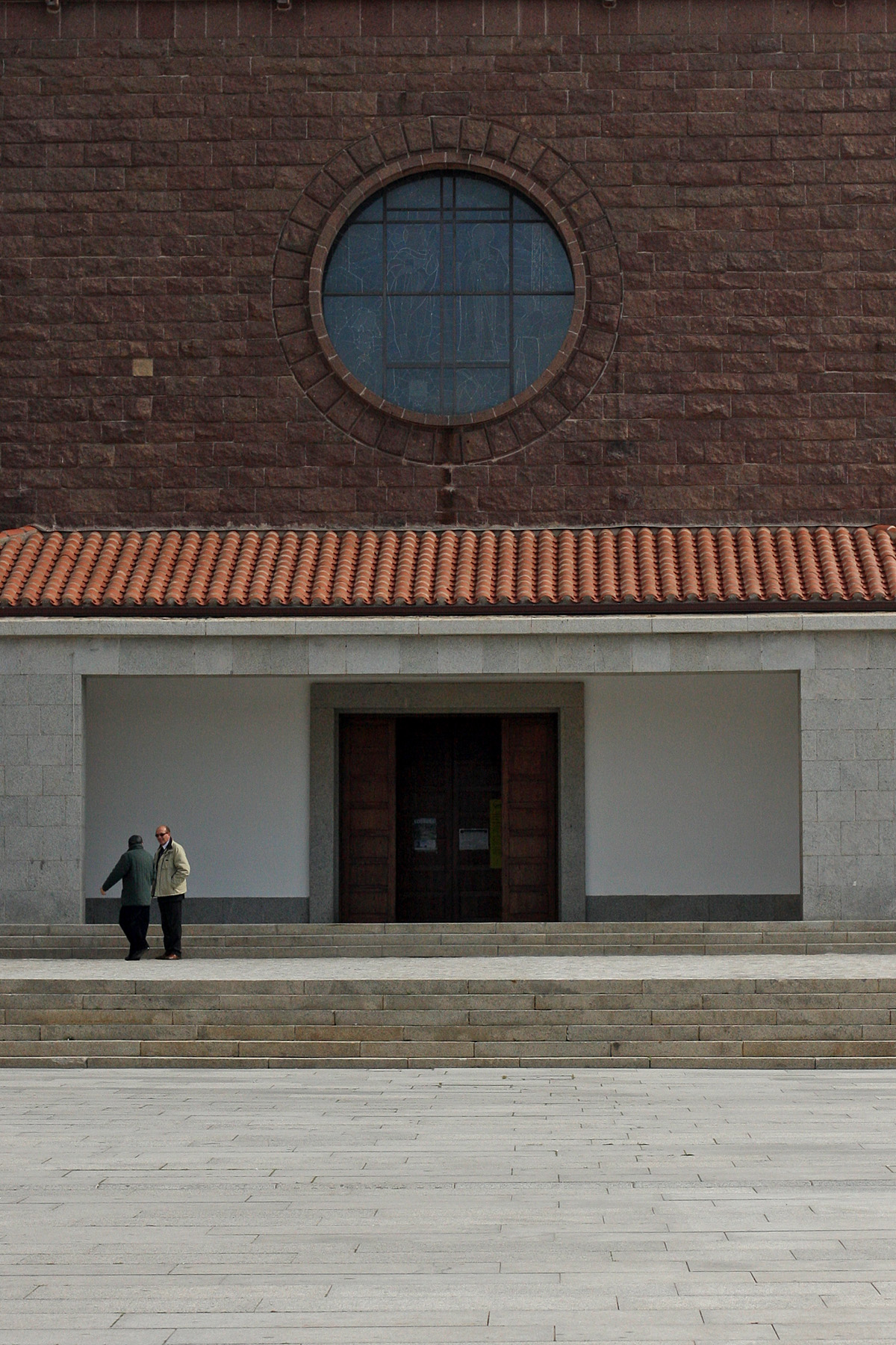 Carbonia (CI)